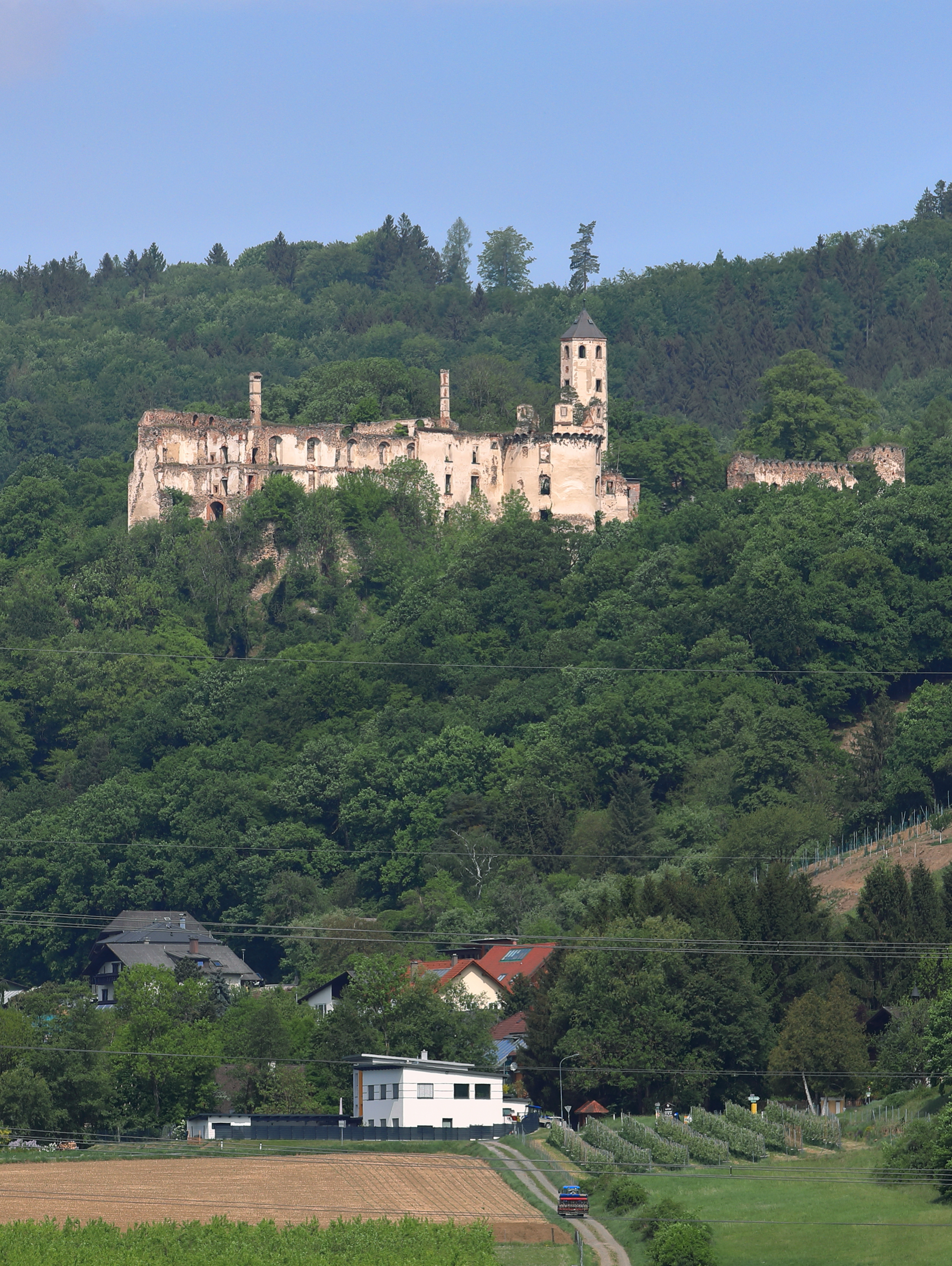 Südostansicht der Burgruine Hohenegg in der niederösterreichischen Marktgemeinde Hafnerbach. Links die Hochburg, mittig die Mittelburg und rechts die Großteils abgetragene Vorburg Die Burg ist urkundlich 1140 und 1170 genannt. Von 1584 bis 1594 wurde sie weitgehend erneuert. 1756 war die Burg als Wohnsitz abgekommen. Ab 1787 erfolgte die Abtragung der Gebäude der nördlich gelegenen Vorburg und der Verfall des Restes.